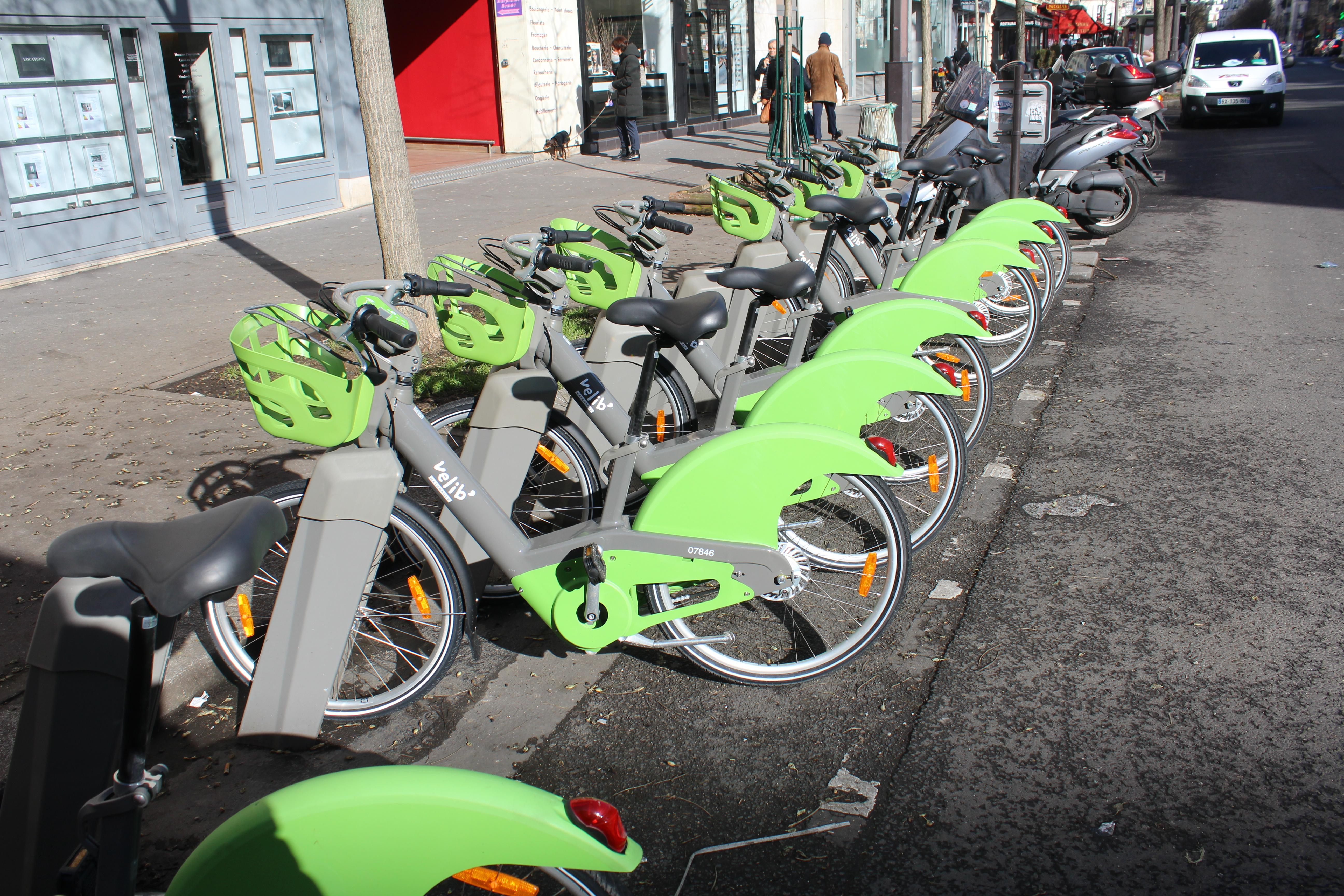 Station Vélib', avenue de Versailles, Paris.